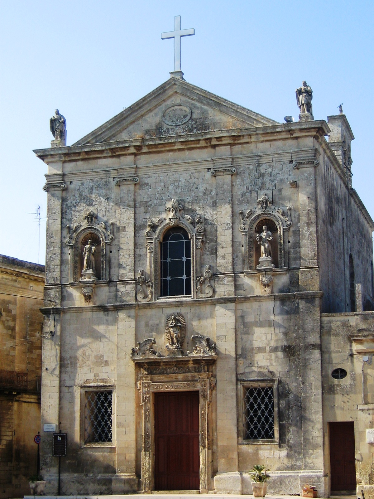 Chiesa dell'Immacolata Martano, provincia di Lecce